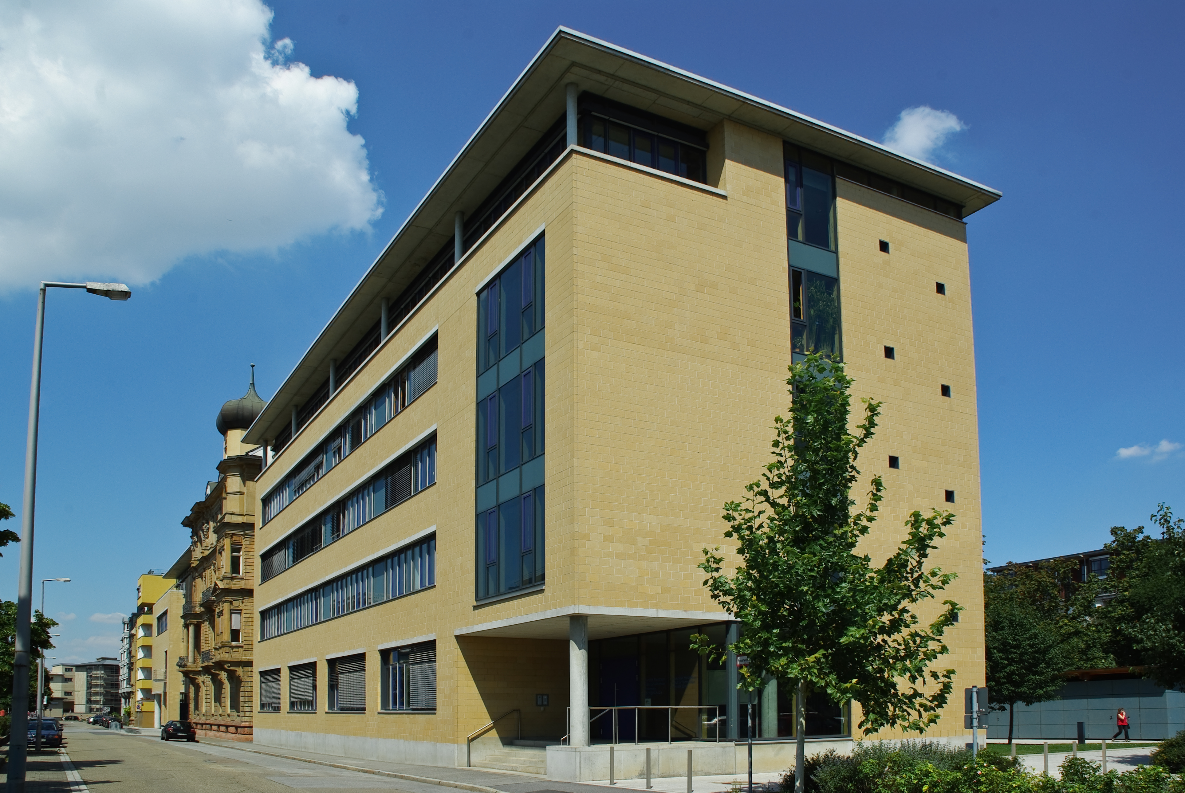 Universität Mannheim - Gebäude B6